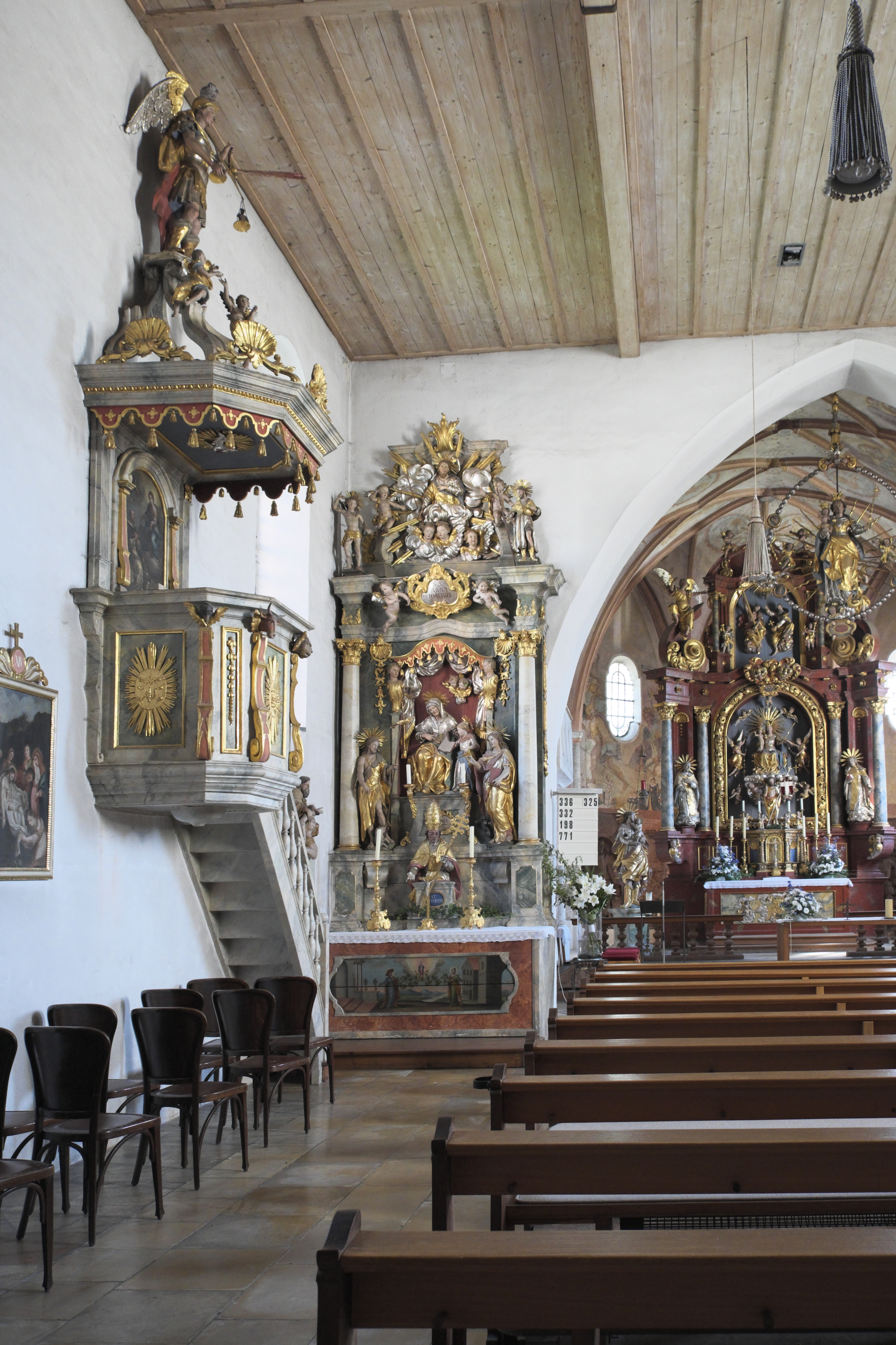 Katholische Filialkirche Unsere Liebe Frau in Gauting im Landkreis Starnberg (Bayern, Deutschland), Innenraum